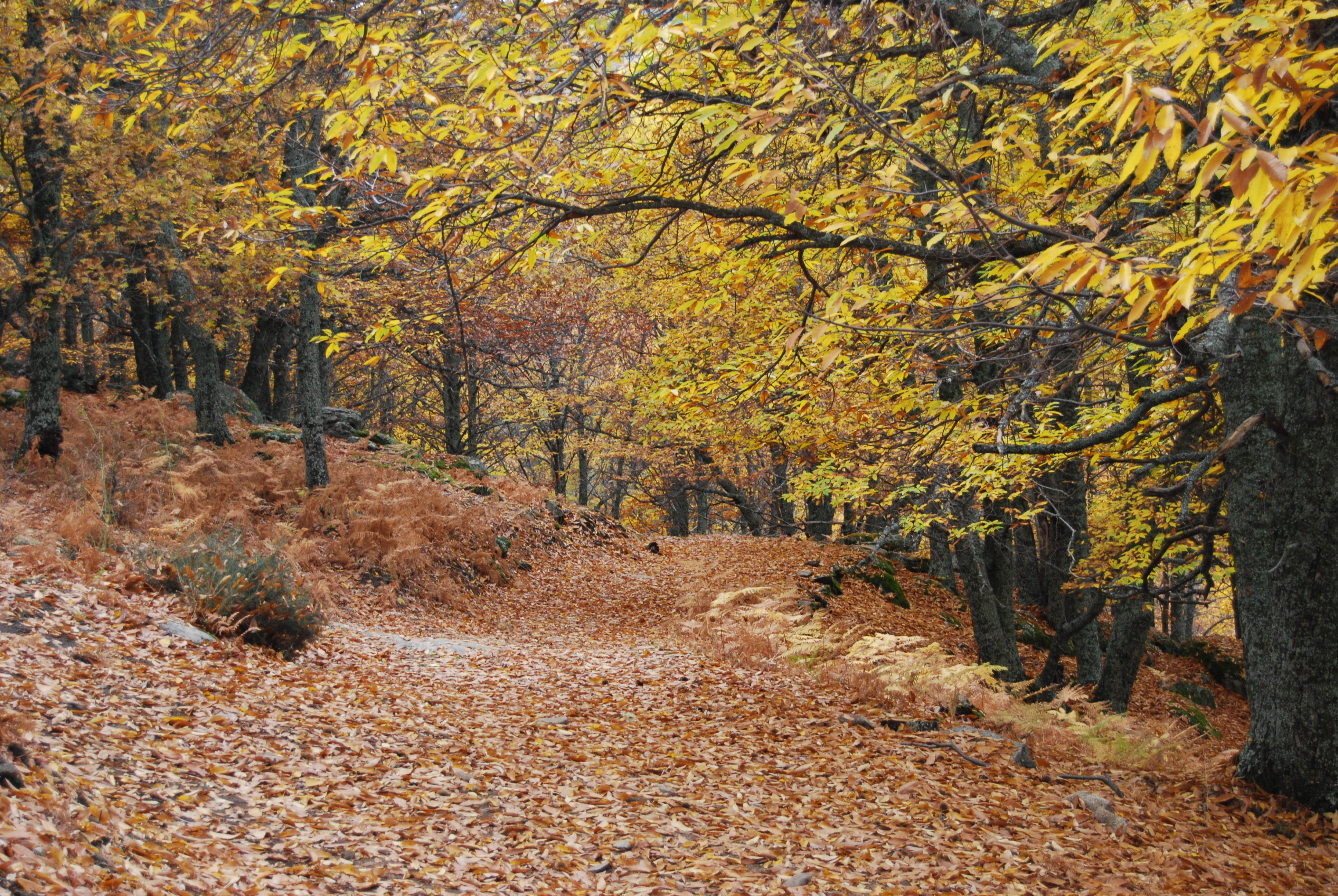 En otoño todas las hojas esparcidas totalmente por el camino impiden ver éste